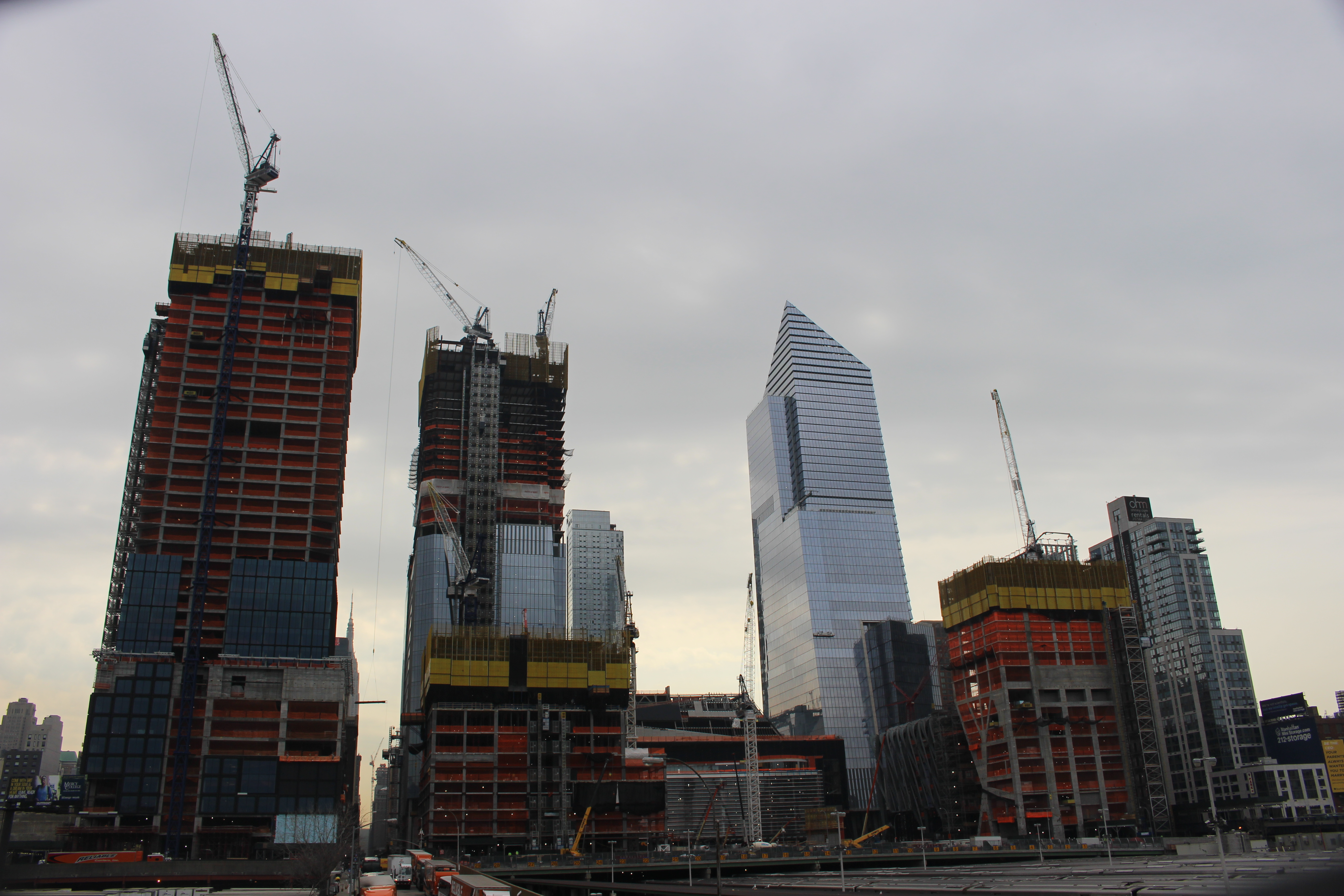 Die Hudson Yards (Eastern Yard) am 12.04.2017, von der "High Line" aus gesehen.